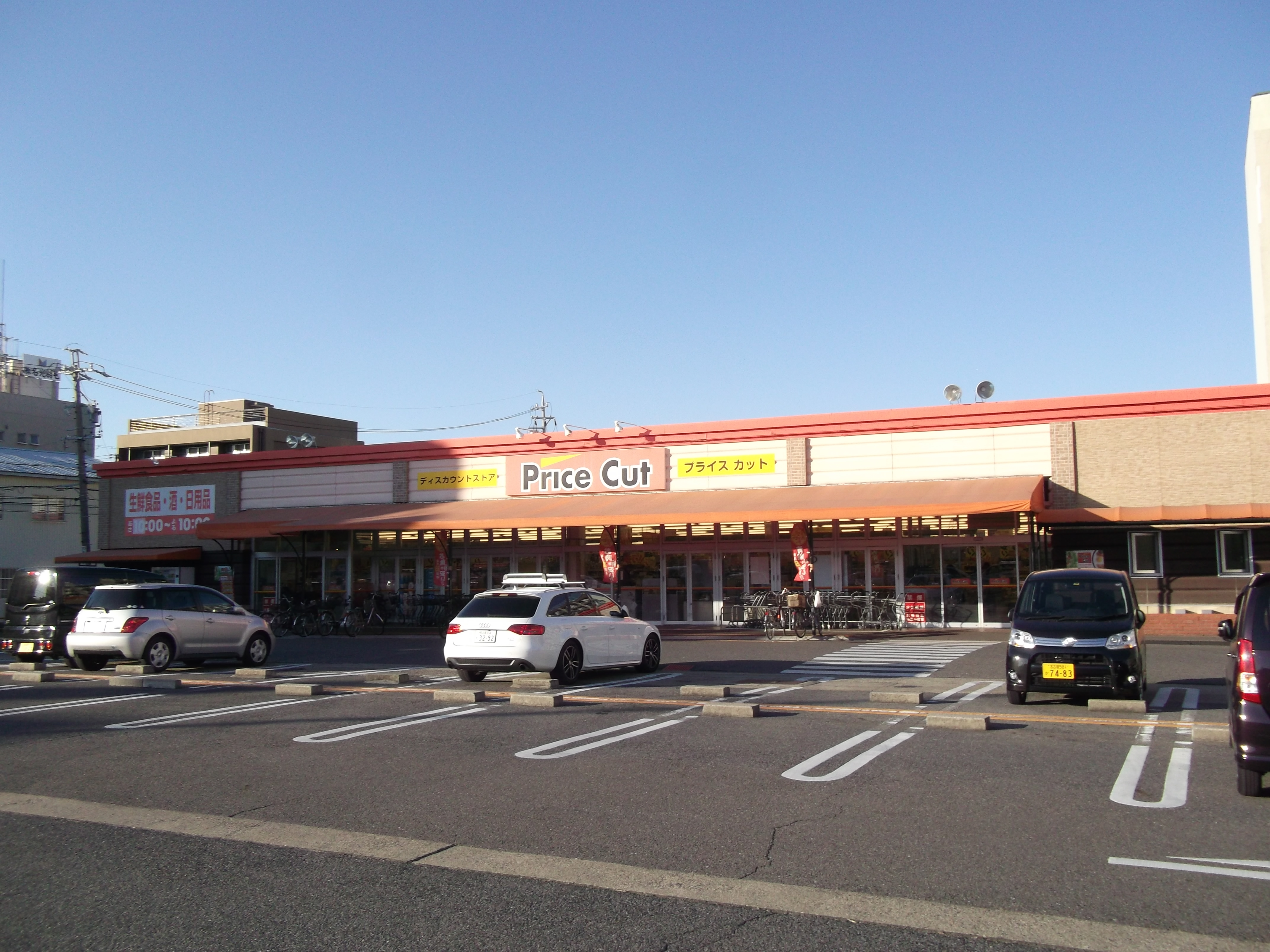 名古屋市西区又穂町にあるスーパーマーケットプライスカット又穂店を南東側から写す